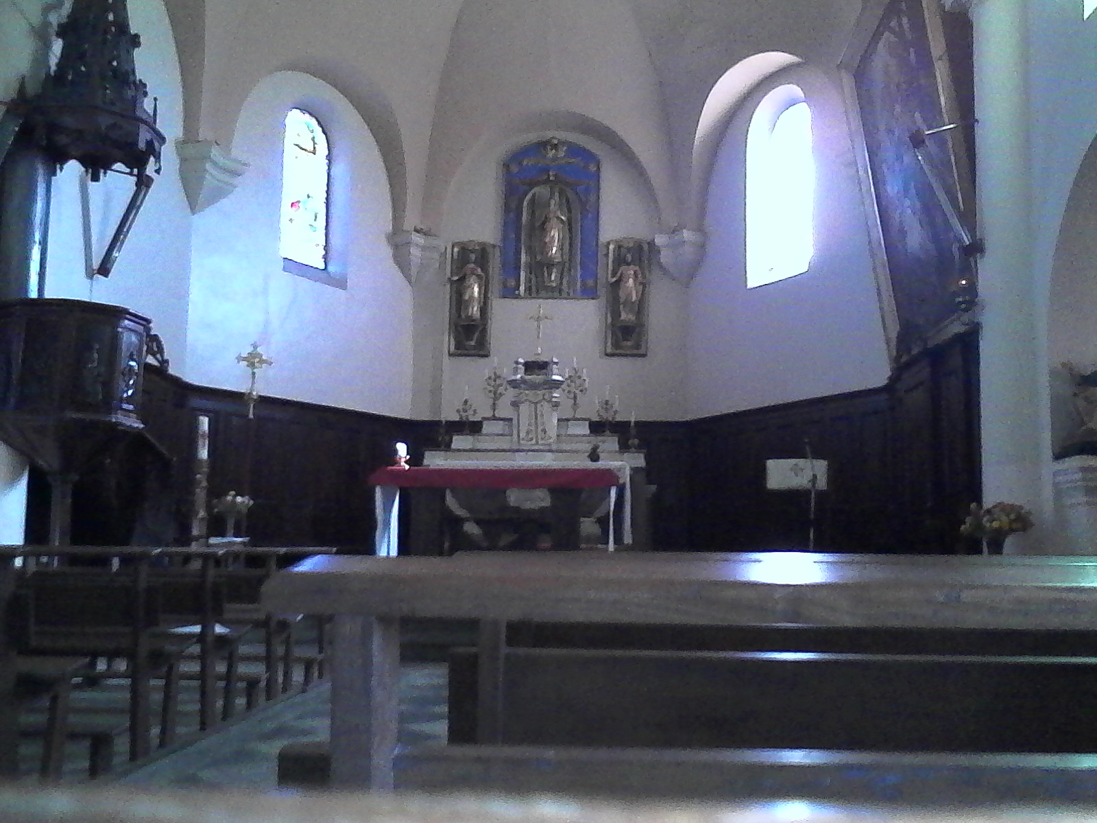 Nef et Chœur de l'église sainte Foy de Laslades